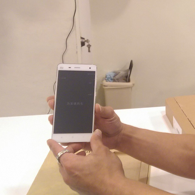 Prise en main du Xiaomi Mi 4